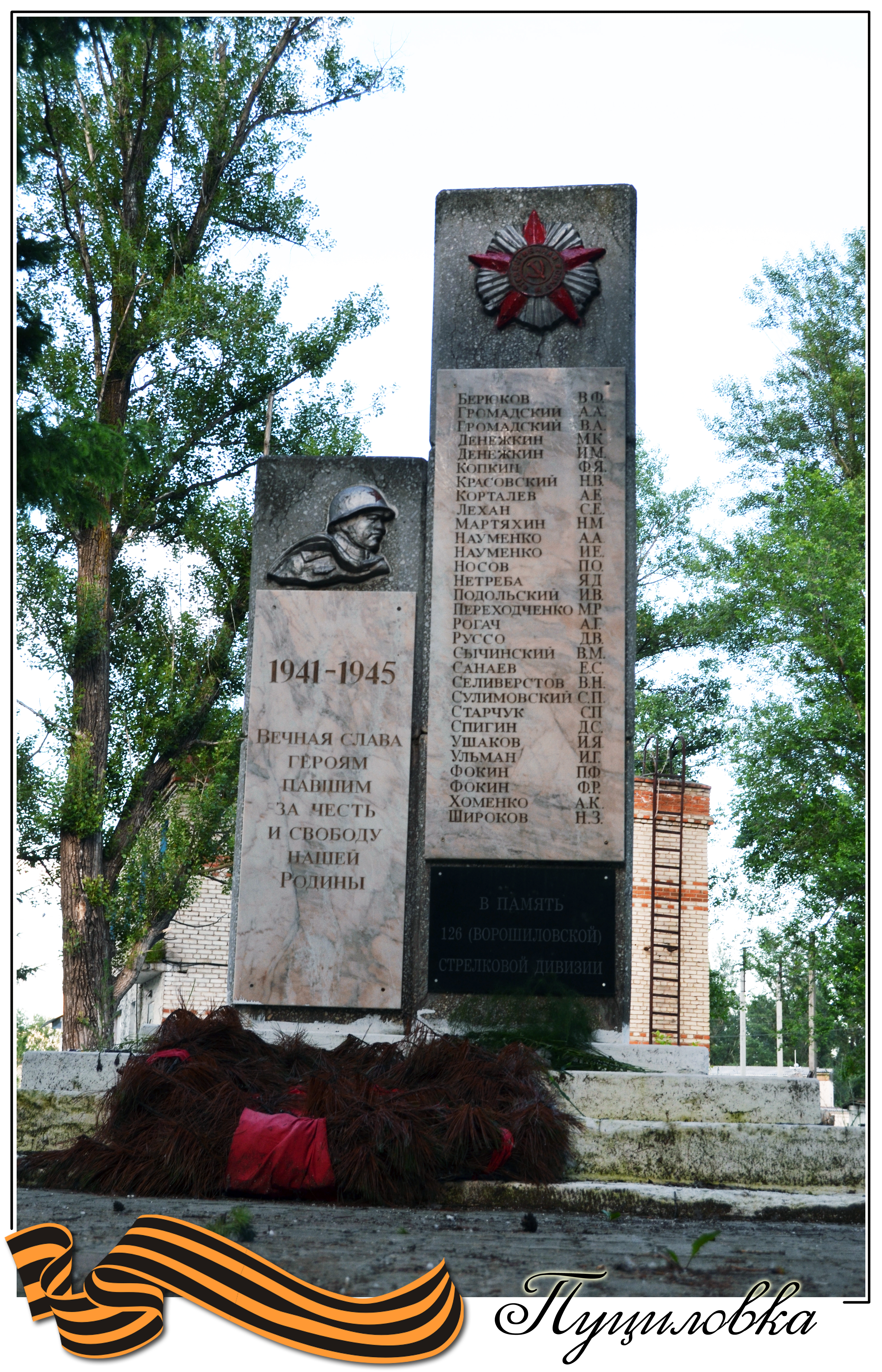 Памятник односельчанам, погибшим в годы Великой Отечественной войны 1941-1945.